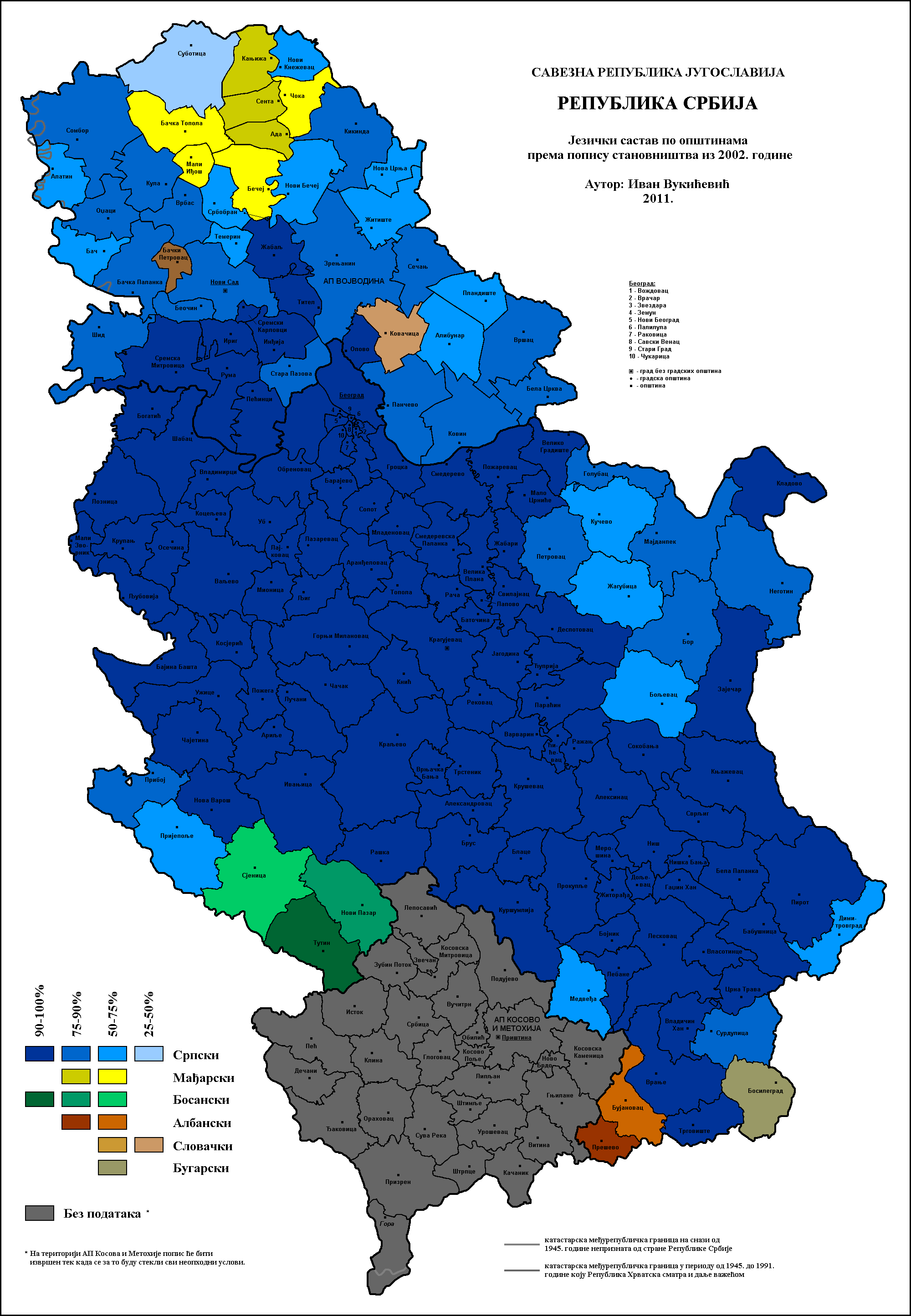 Језички састав Србије по општинама 2002. године. Аутор: Иван Вукићевић